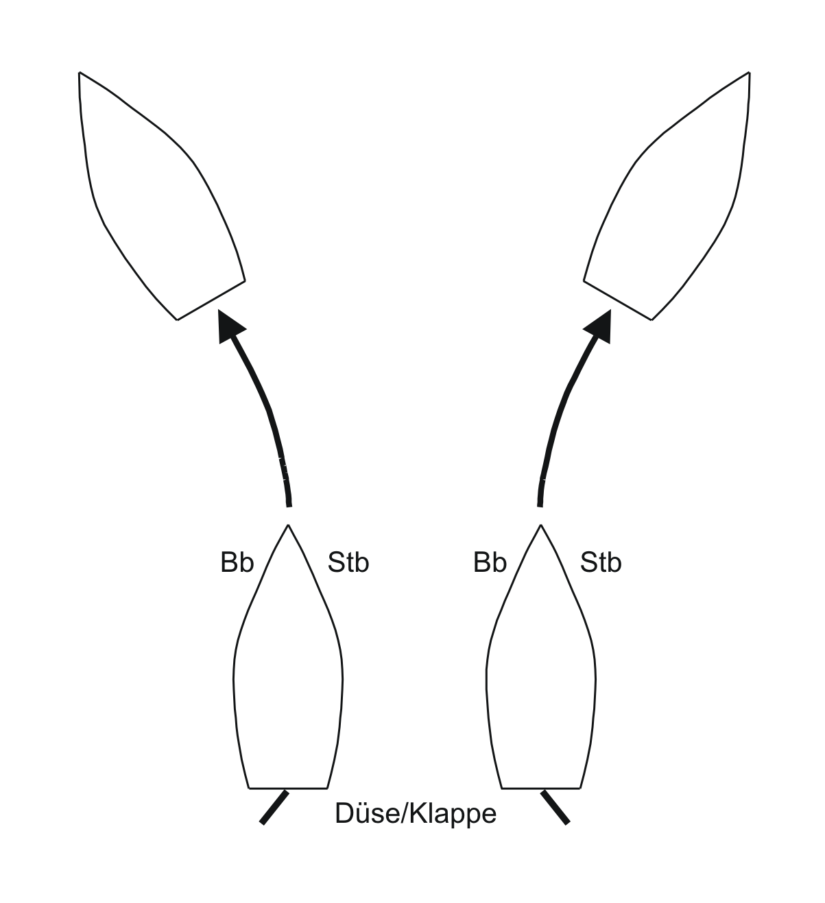 Wirkung der Stellung der Düse bzw. der Klappe bei einem Wasserstrahlantrieb